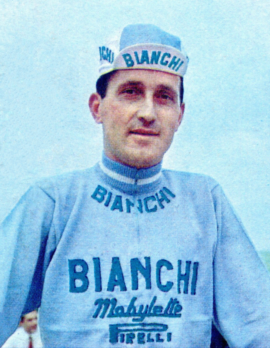 CAMPIONI DELLO SPORT 1966/67 - Figurina/Sticker n. 213 - BRUNO MEALLI -Rec